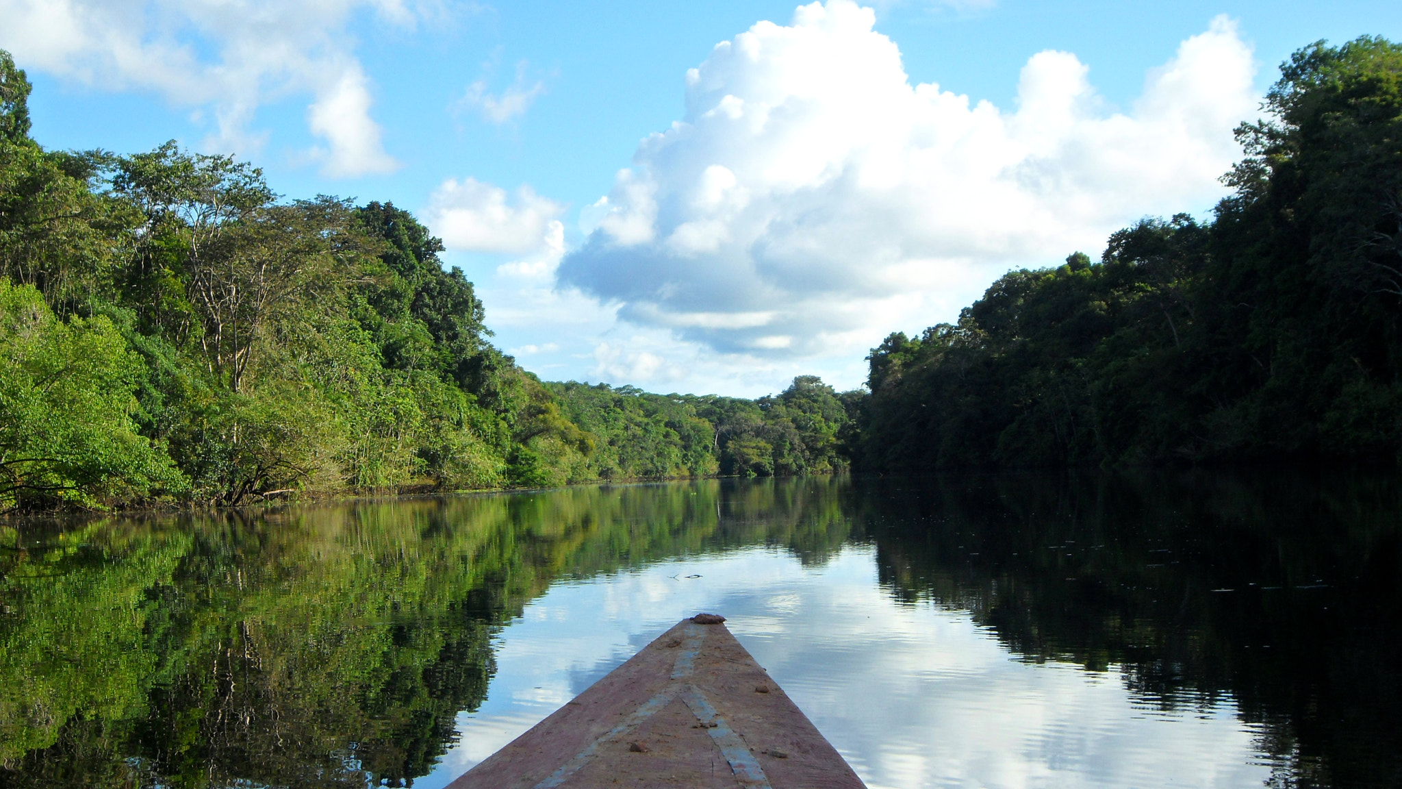 500px provided description: Pacaya-Samiria National Reserve, Peru